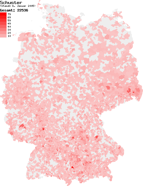 Verteilung des Nachnamens Schuster in Deutschland nach dem Telefonbuch mit Stand vom 6. Januar 2005